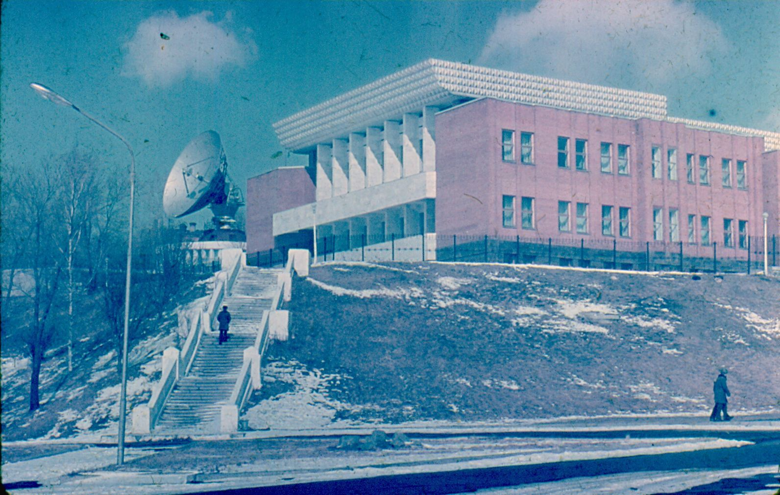 Орбита в Хабаровске, март 1983 года